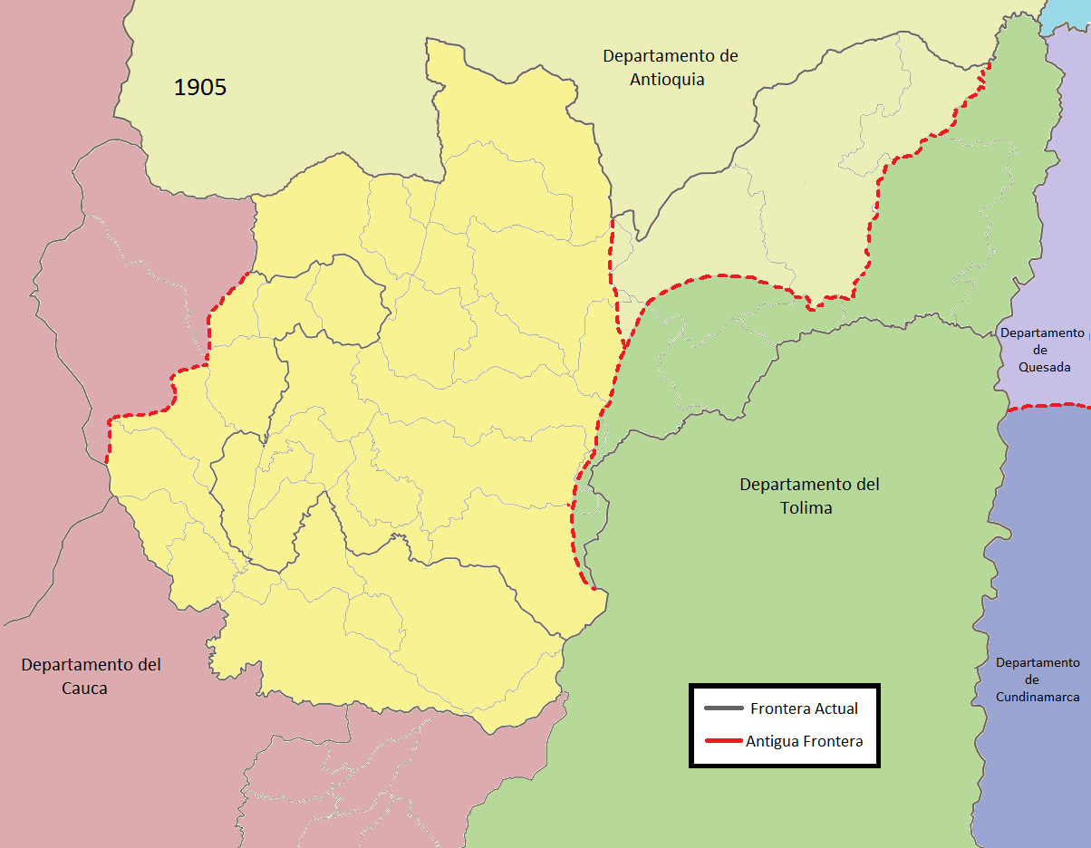 Mapa histórico de Caldas en 1905